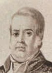 Manuel Alves Branco, Visconde de Caravelas